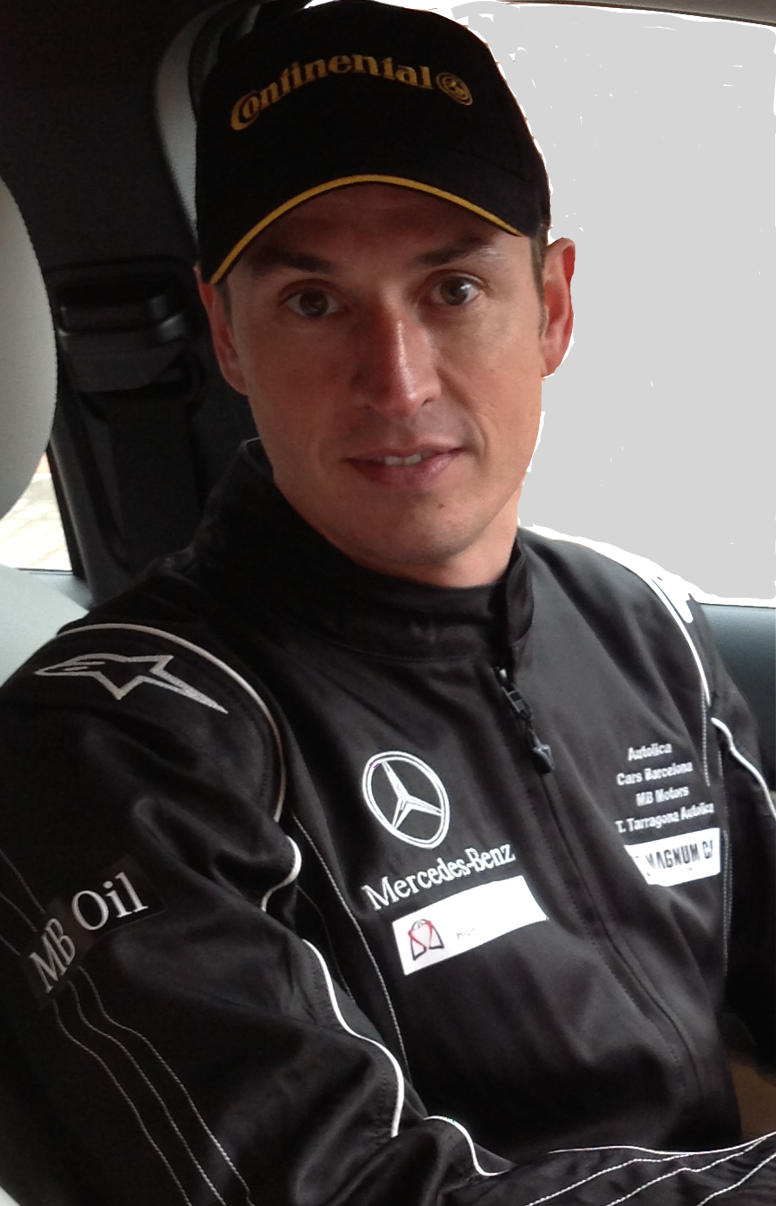 El Piloto Agustín Payá del Mercedes Quadis ECOTeam